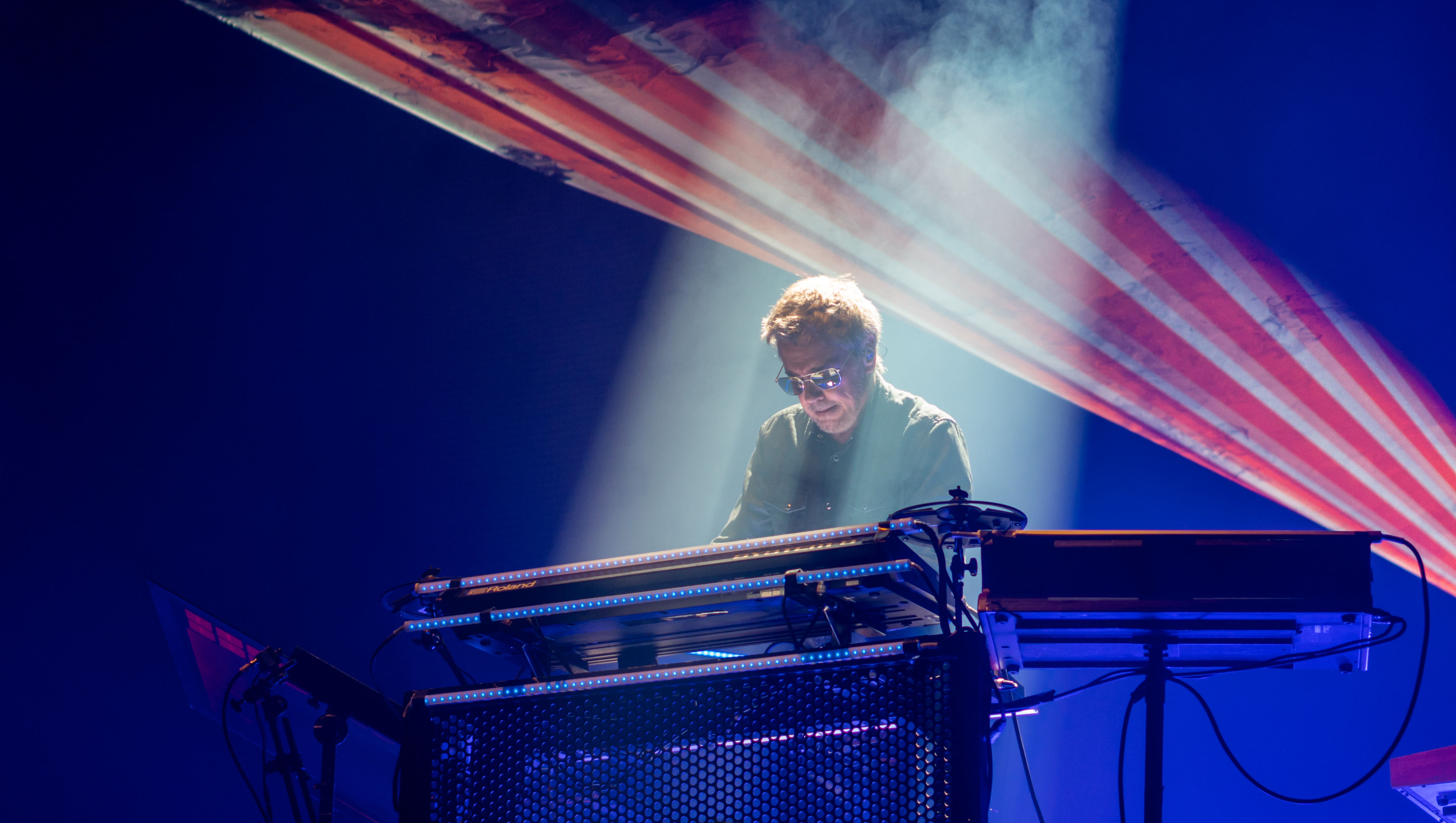 Coachella18W1-93